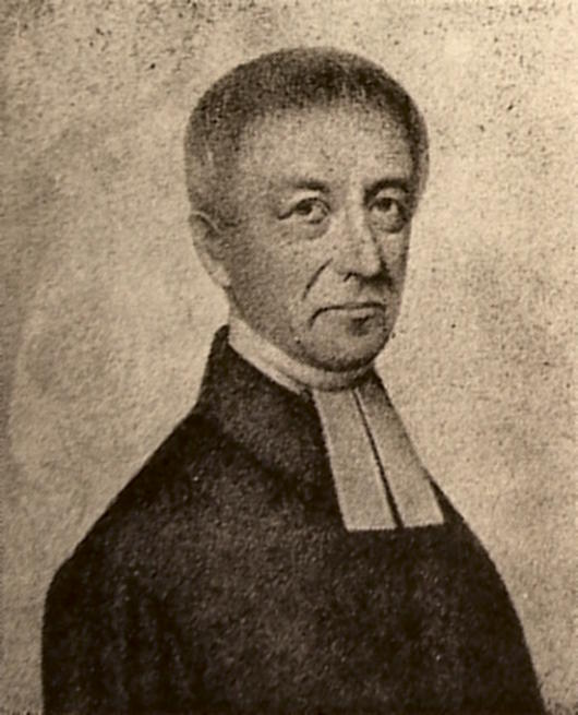 Christian Friedrich Stempel (1787–1867) war ein niedersorbischer Pfarrer und Dichter.